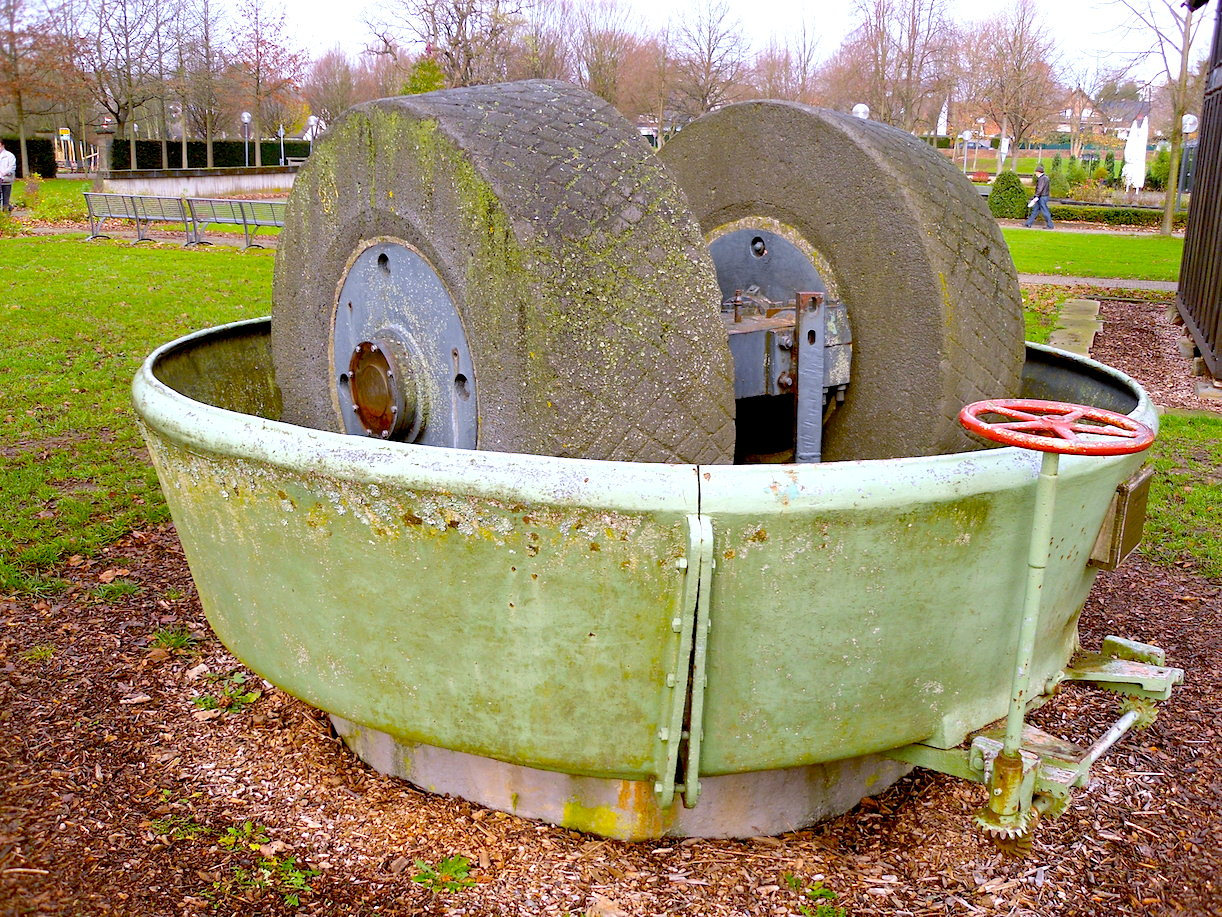 Historischer Kollergang im Park am Haus Martfeld, Schwelm, Deutschland.